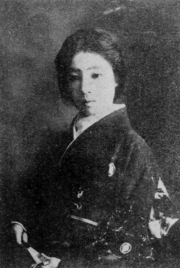 玉村歌路 1919